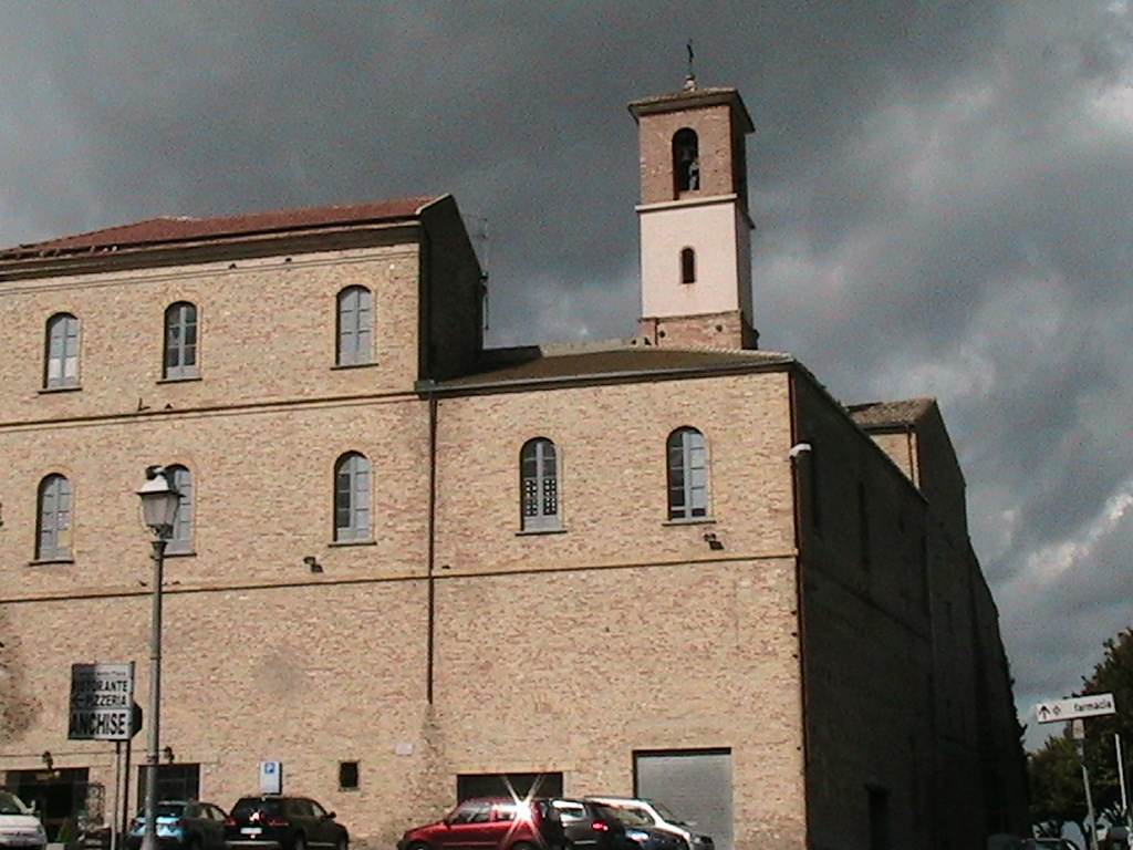 Tortoreto - Veduta del Centro storico